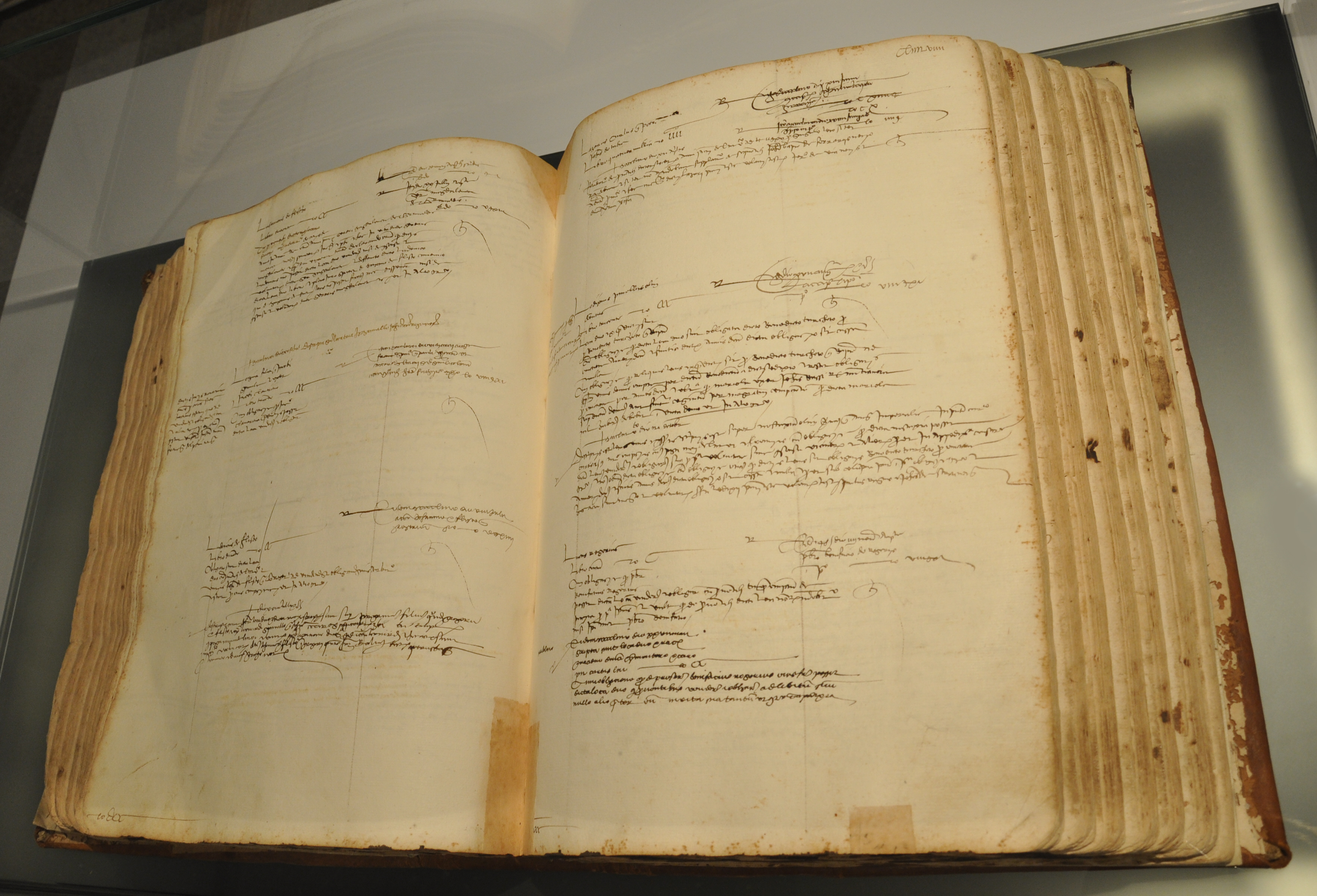 Libro delle Colonne (Buch mit Listen der Zeichner der Genuesischen Staatsanleihen, die über die Casa di San Giorgio finanziert wurden), San Lorenzo 1485; Archivio di Stato di Genova, San Giorgio, Colonne, 359